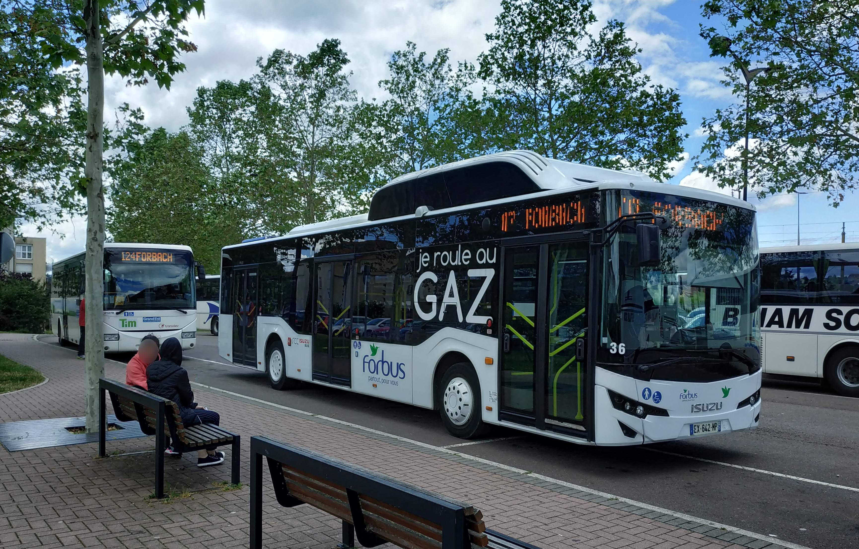 Isuzu Citiport CNG n°36 du réseau Forbus (Forbach)